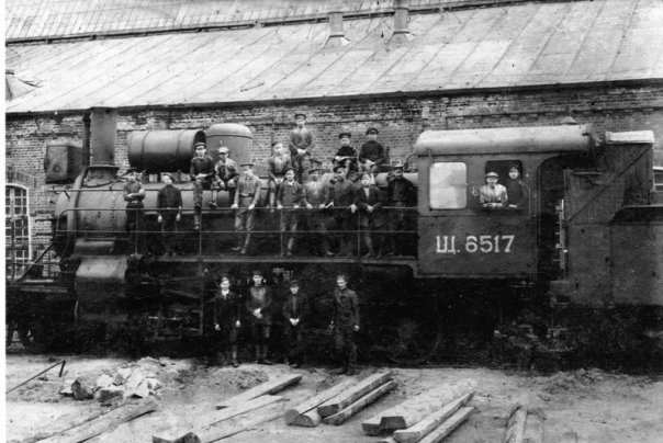 Паровоз Щ-6517